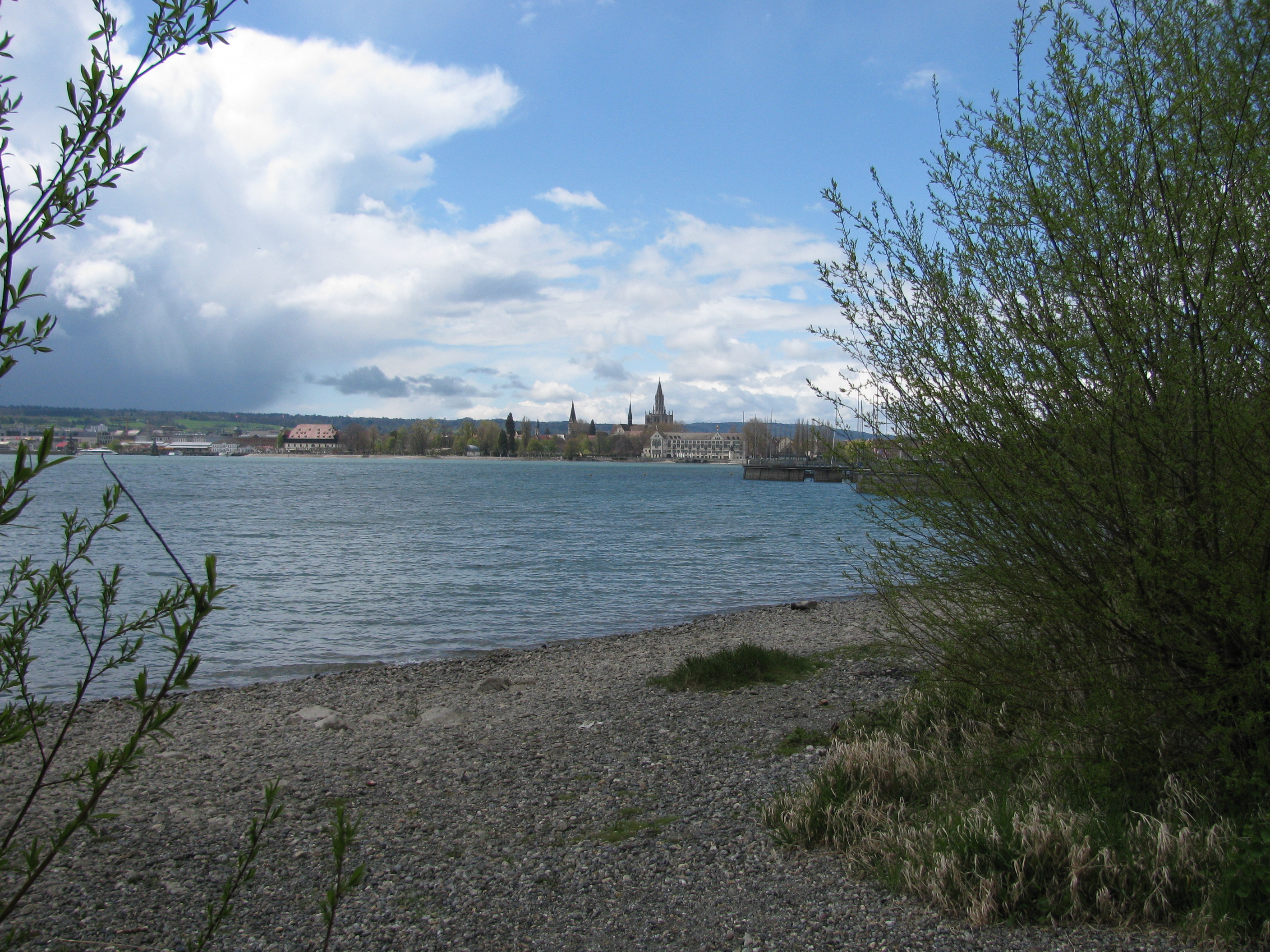 Deutschland (D) - Baden-Württemberg (BW) - Landkreis Konstanz (KN) - Konstanz: Vogelschutzgebiet "Konstanzer Bucht des Bodensees"